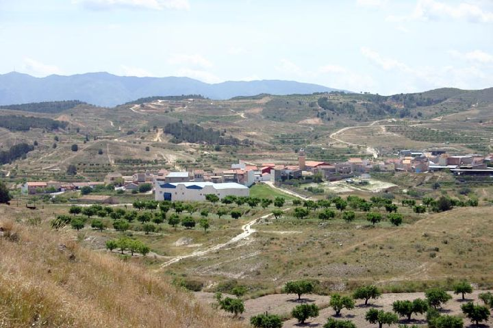 pedania murciana